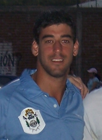 Foto del jugador argentino de fútbol Néstor Gabriel Martinena.